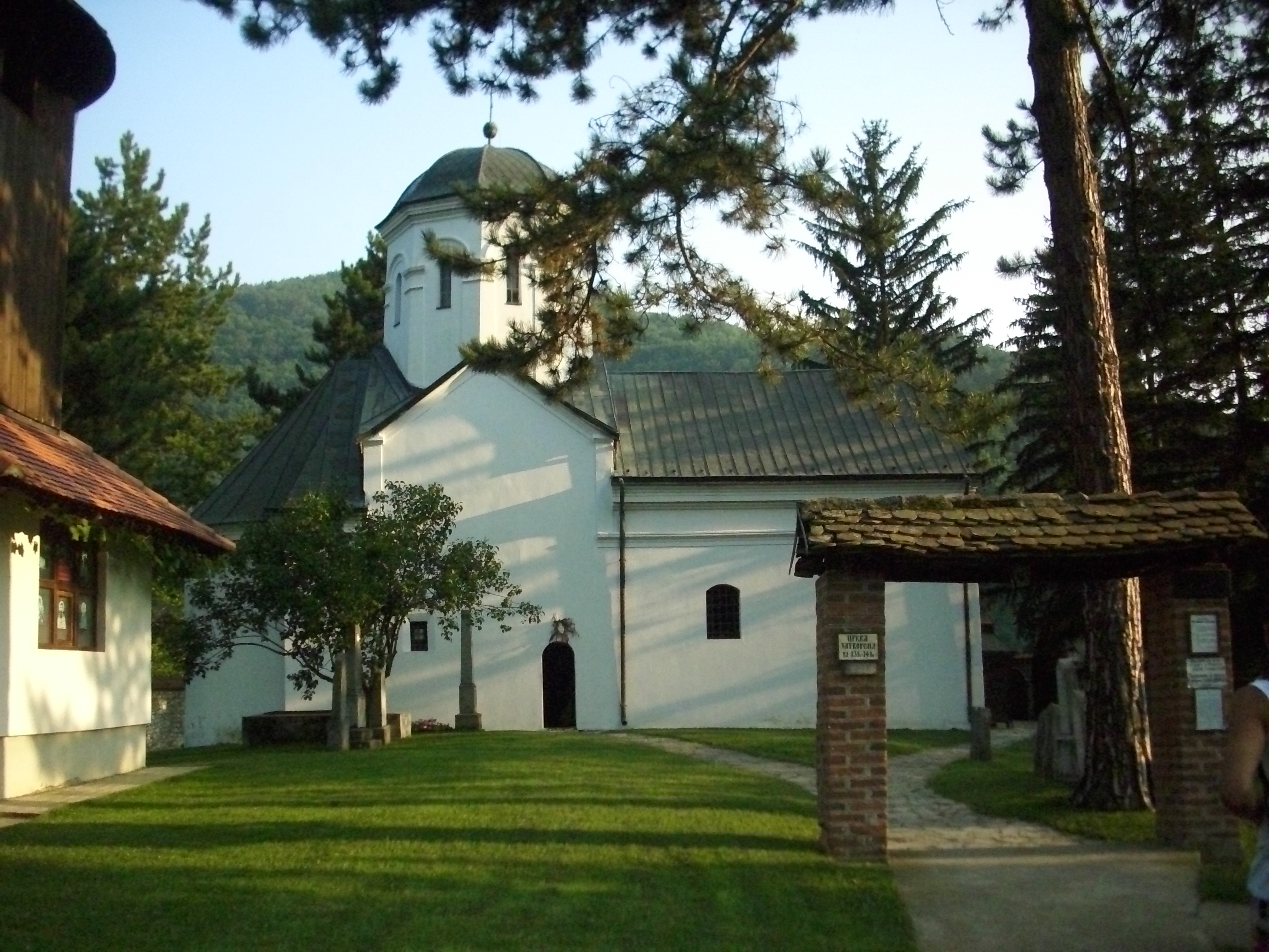 Манастир ћелије